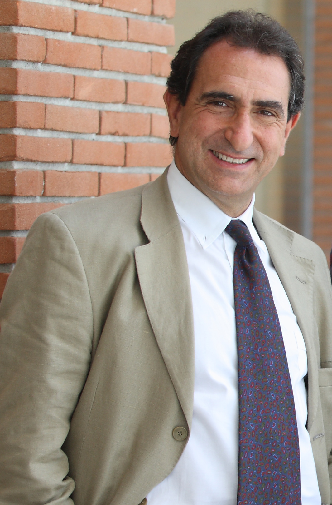 Roma, Auditorium Parco della Musica 23 06 2009. Incontro stampa con il coreografo belga Sidi Larbi Cherkaoui .Nella foto: Carlo Fuortes.©Musacchio&Ianniello